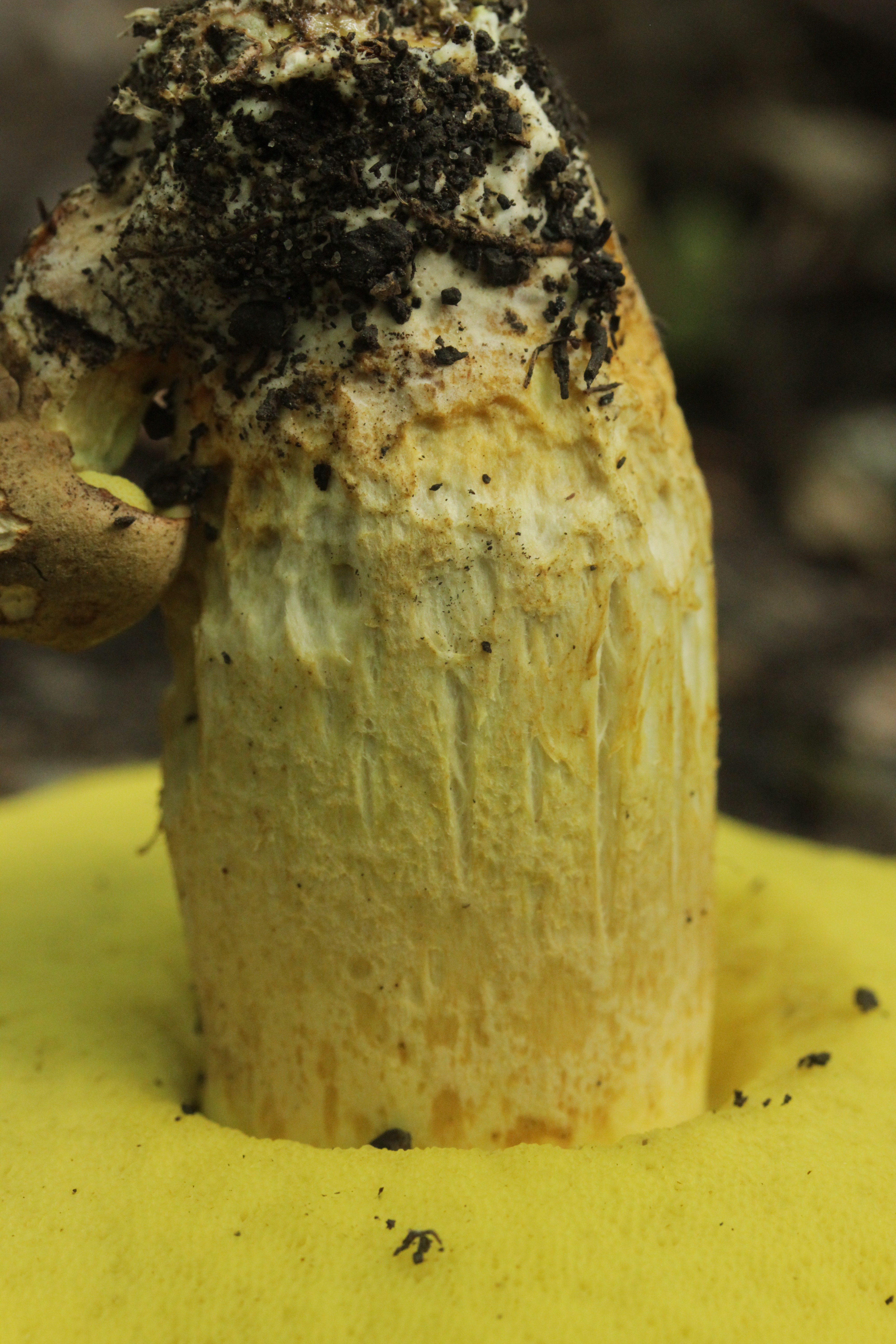 Iodine Bolete - Hemileccinum impolitum